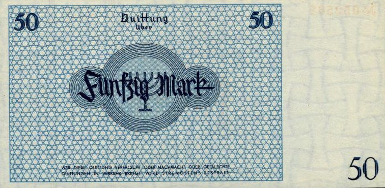 zdjęcie banknotu 50 Marek z getta w Łodzi